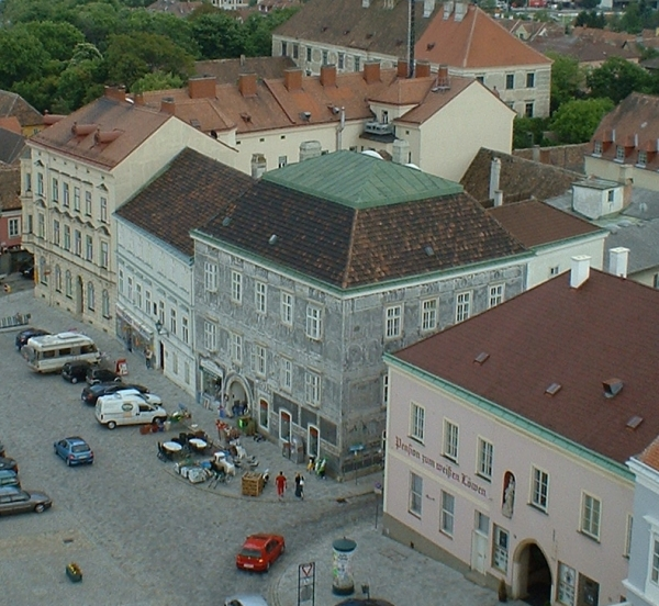 Bildbeschreibung: Sgraffitohaus in Retz Quelle: selbst fotografiert Fotograf/Zeichner: Stephan Reuthner Datum: 6/2005